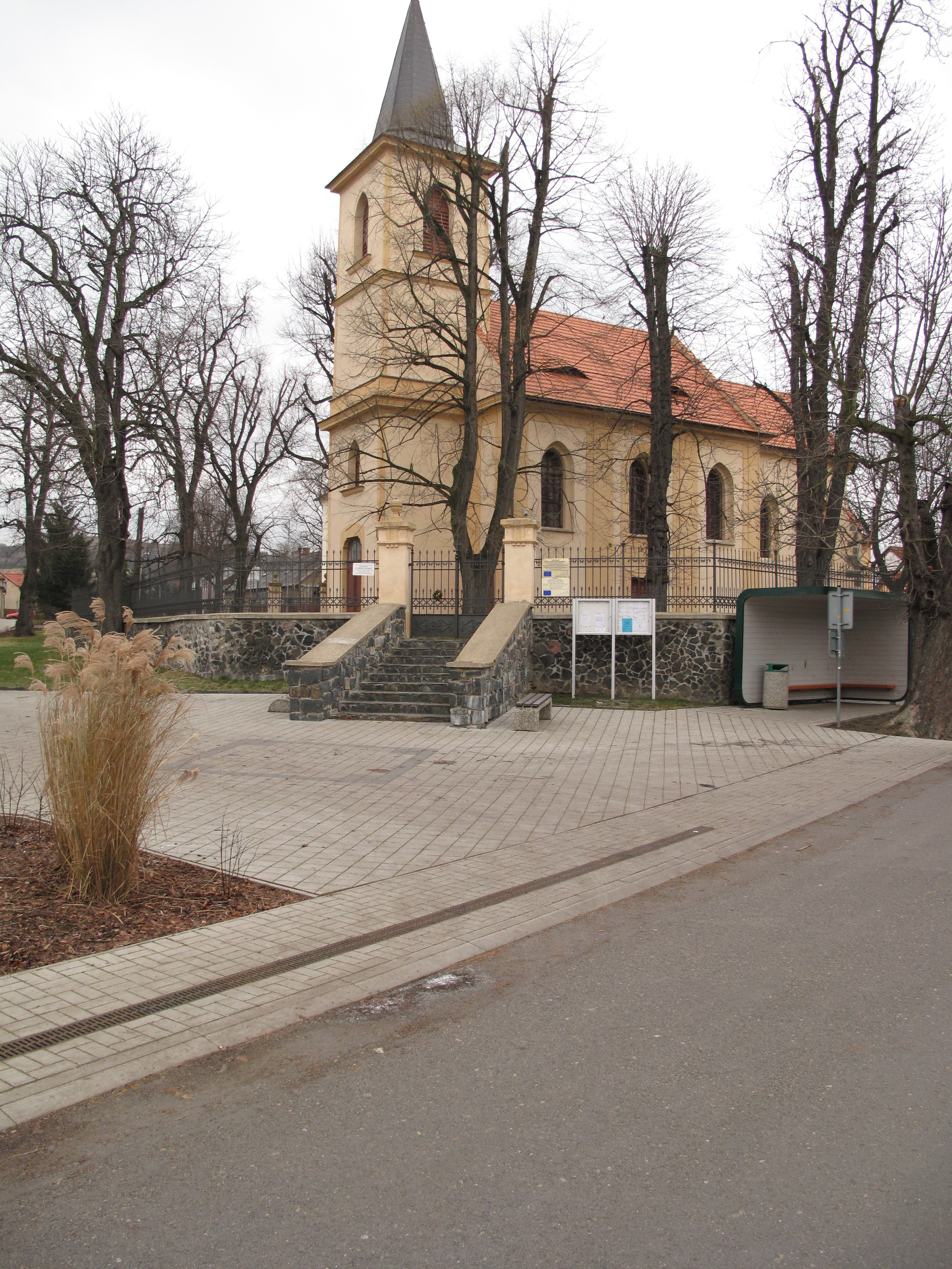 Kostel v Solanech. Okres Litoměřice, Česká republika.